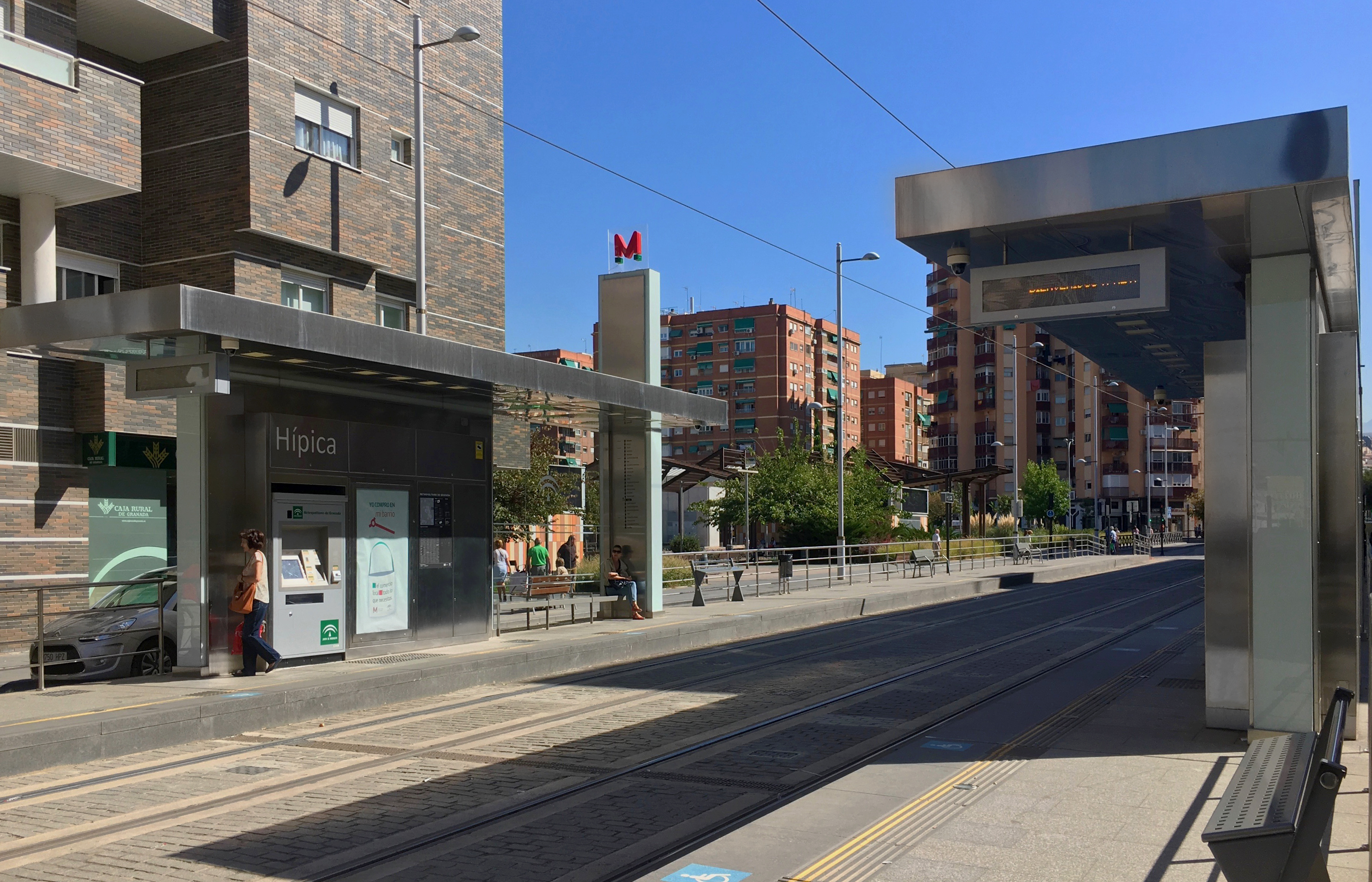 Estación de Hípica del Metro de Granada